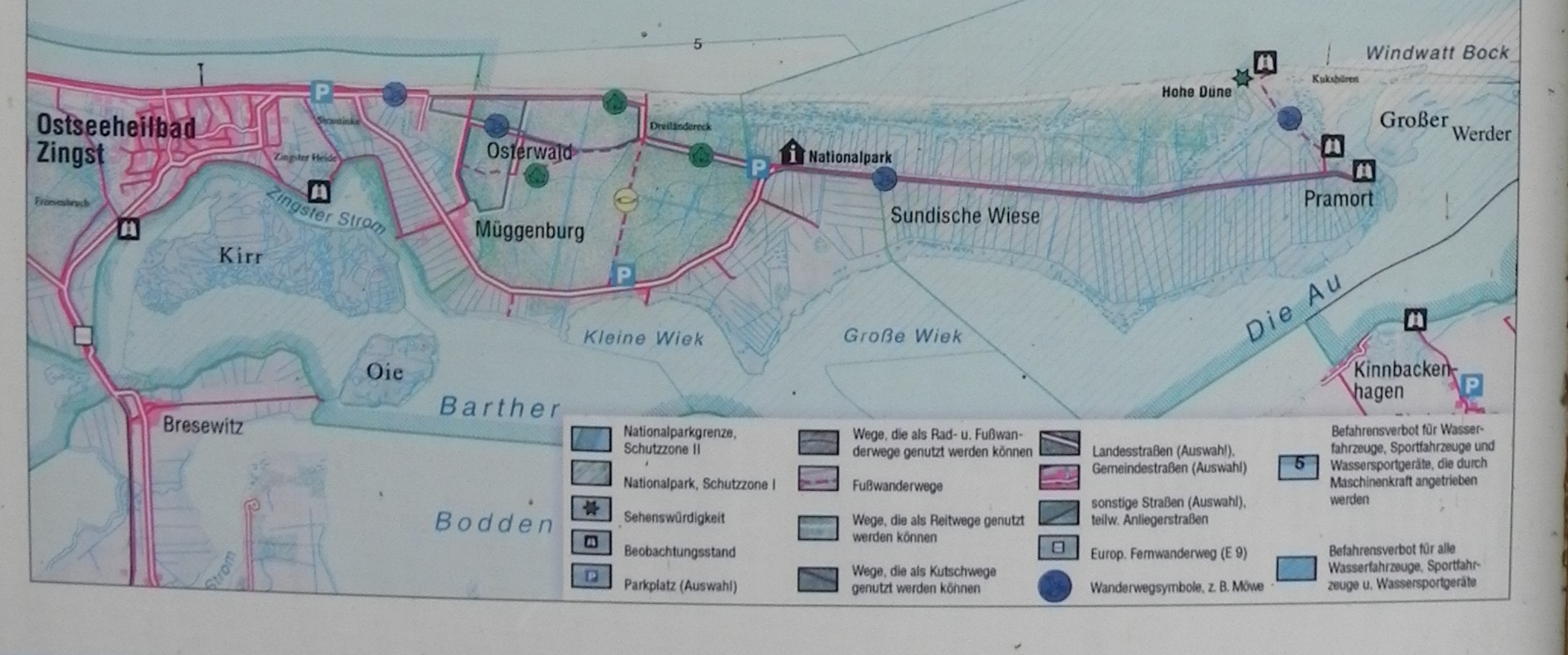 Infotafel an den Sundischen Wiesen, erstellt vom Staatlichen Amt für Umwelt und Natur Stralsund